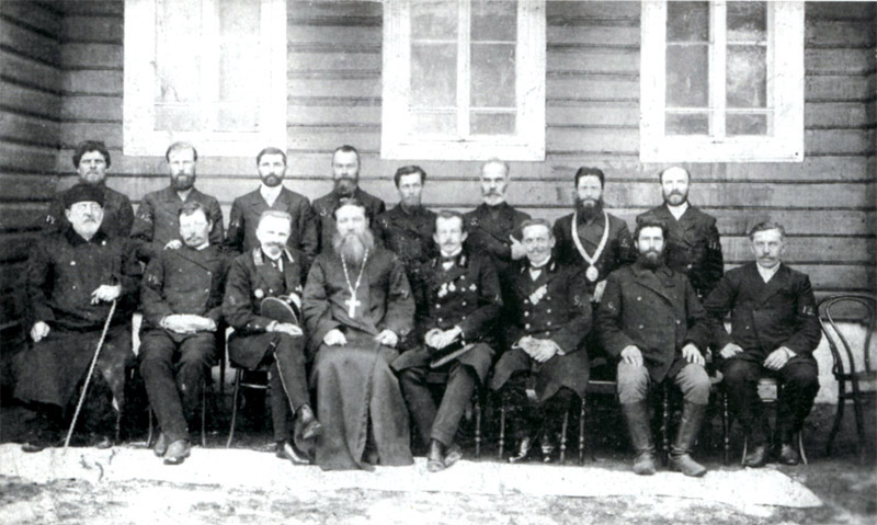 Деятели Никольского уездного Земского собрания и Управы. Состав после выборов 1911 г. Фото 1910-х гг.